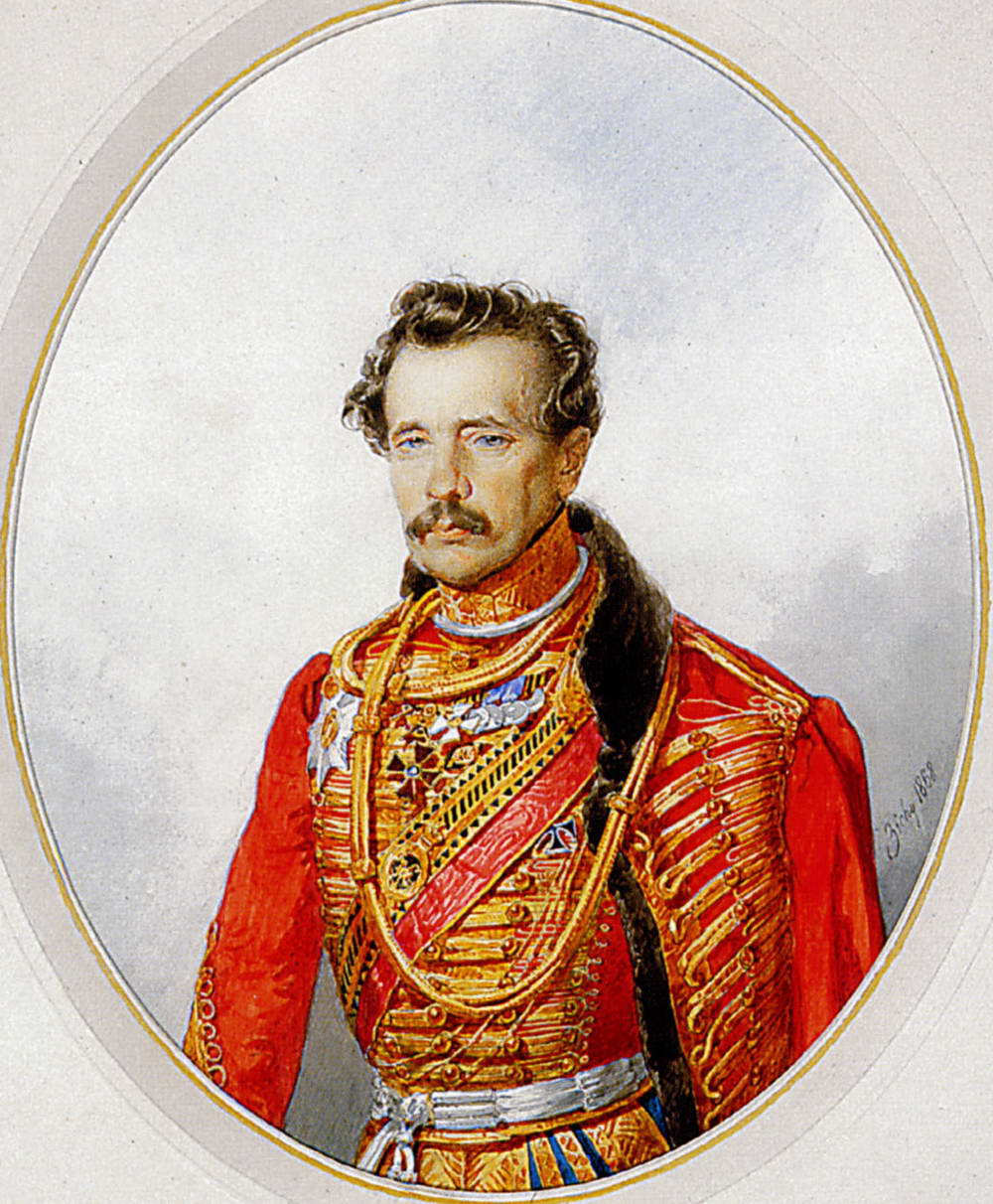 Хомутов Михаил Григорьевич (1759-1864), генерал-адъютант, генерал от кавалерии.